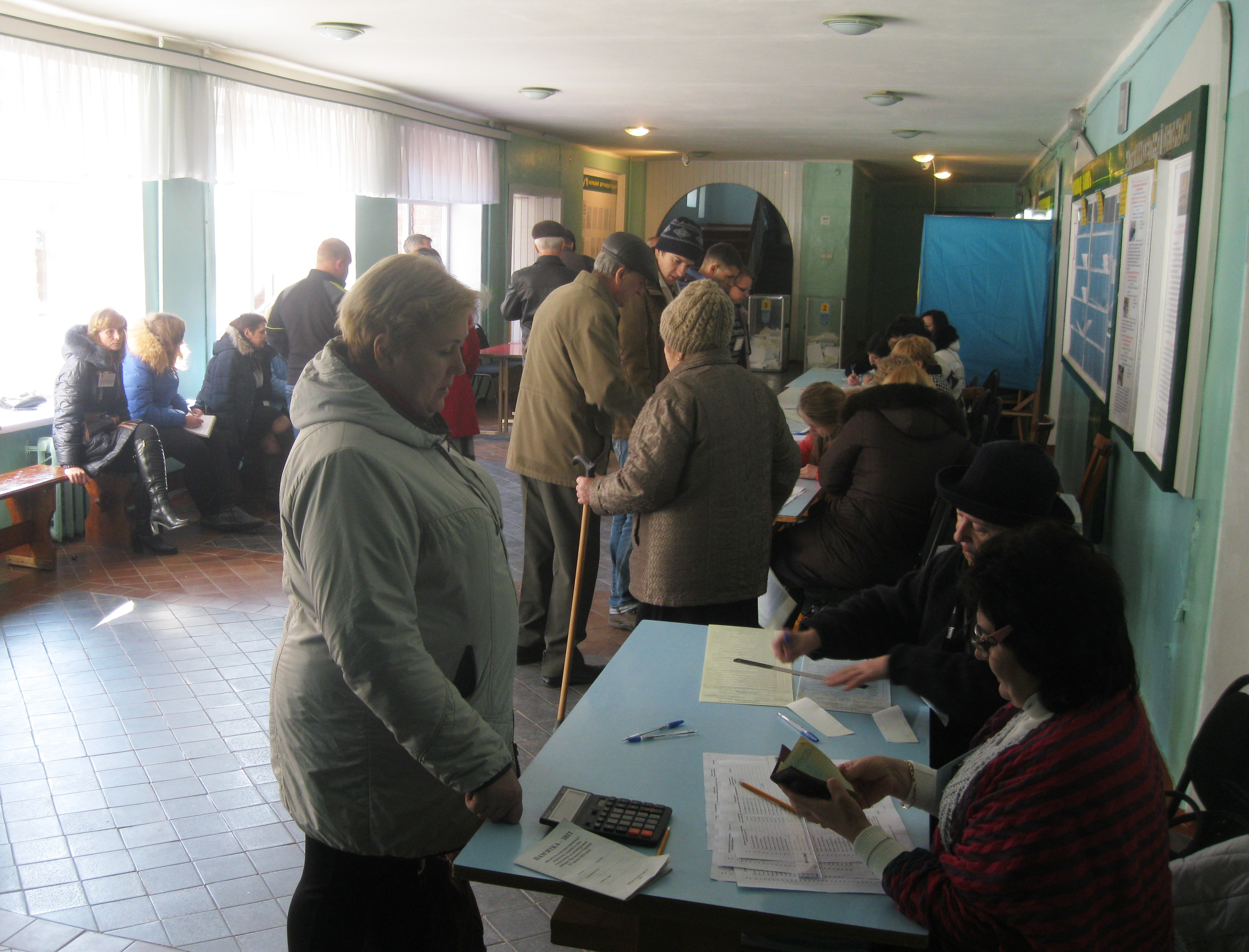 Голосування на виборчій дільниці у Білій Церкві на парламентських виборах 2014 року